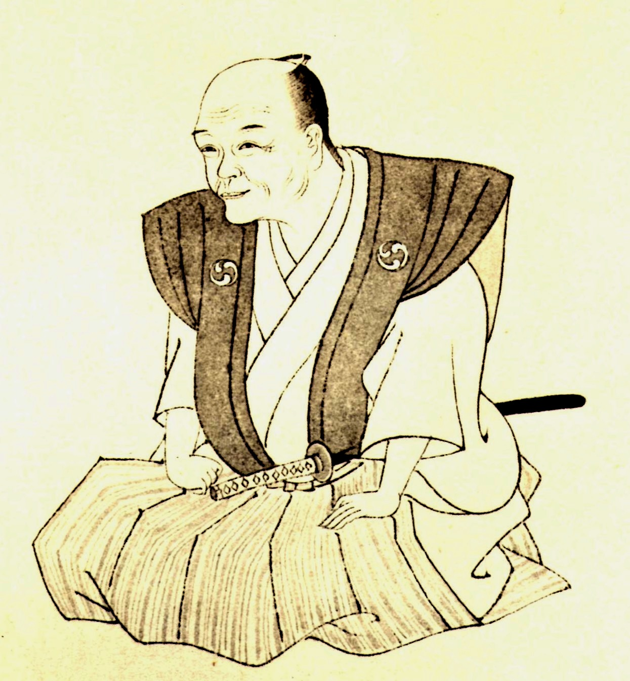 『國文学名家肖像集』から。 博美社により刊行された（1939.5.25）